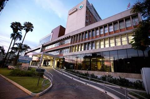 Entrada Principal, Av José de Alencar